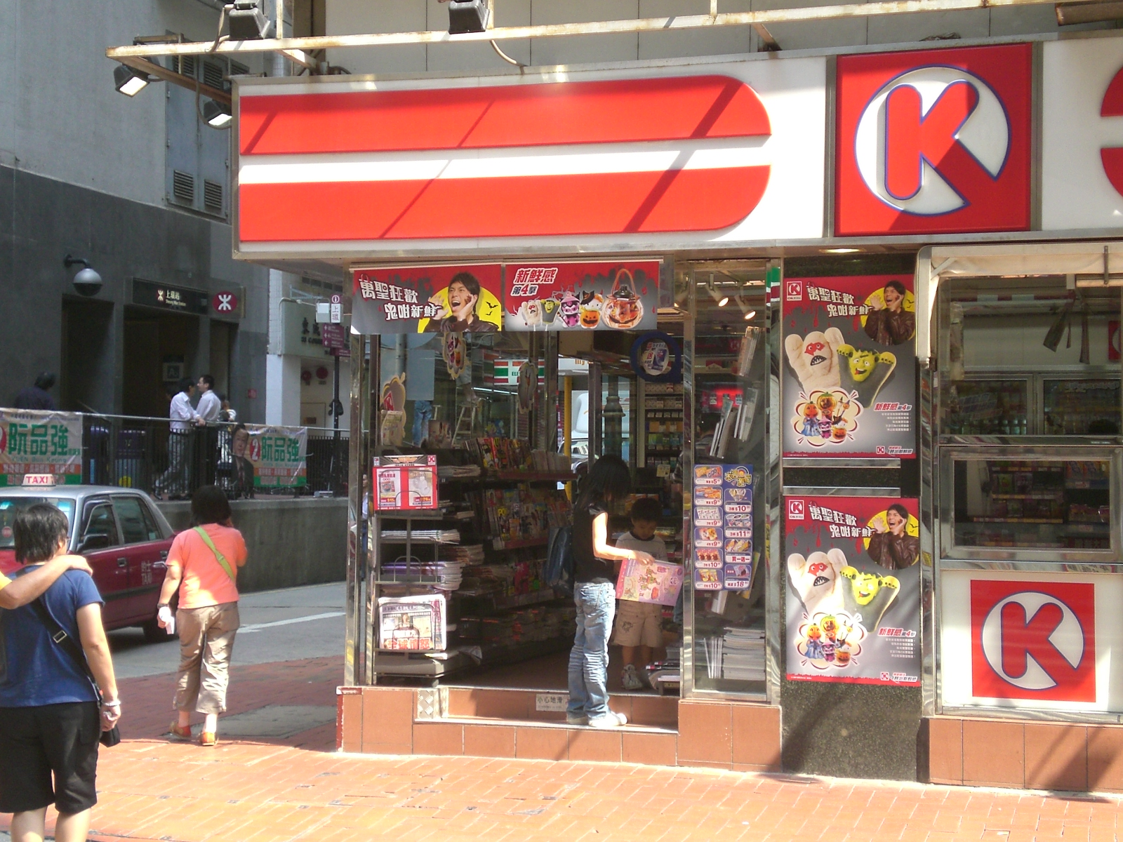 禧利街, 中西區, 上環, Hillier Street, Sheung Wan, Hong KongSheung Wan Station exit A2